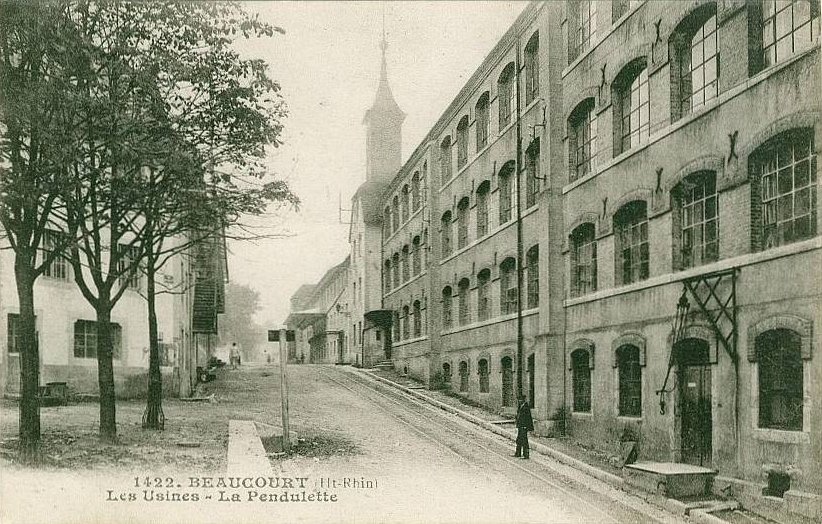 Ancienne Pendulerie de Beaucourt abritant aujourd'hui le Musée Frédéric Japy